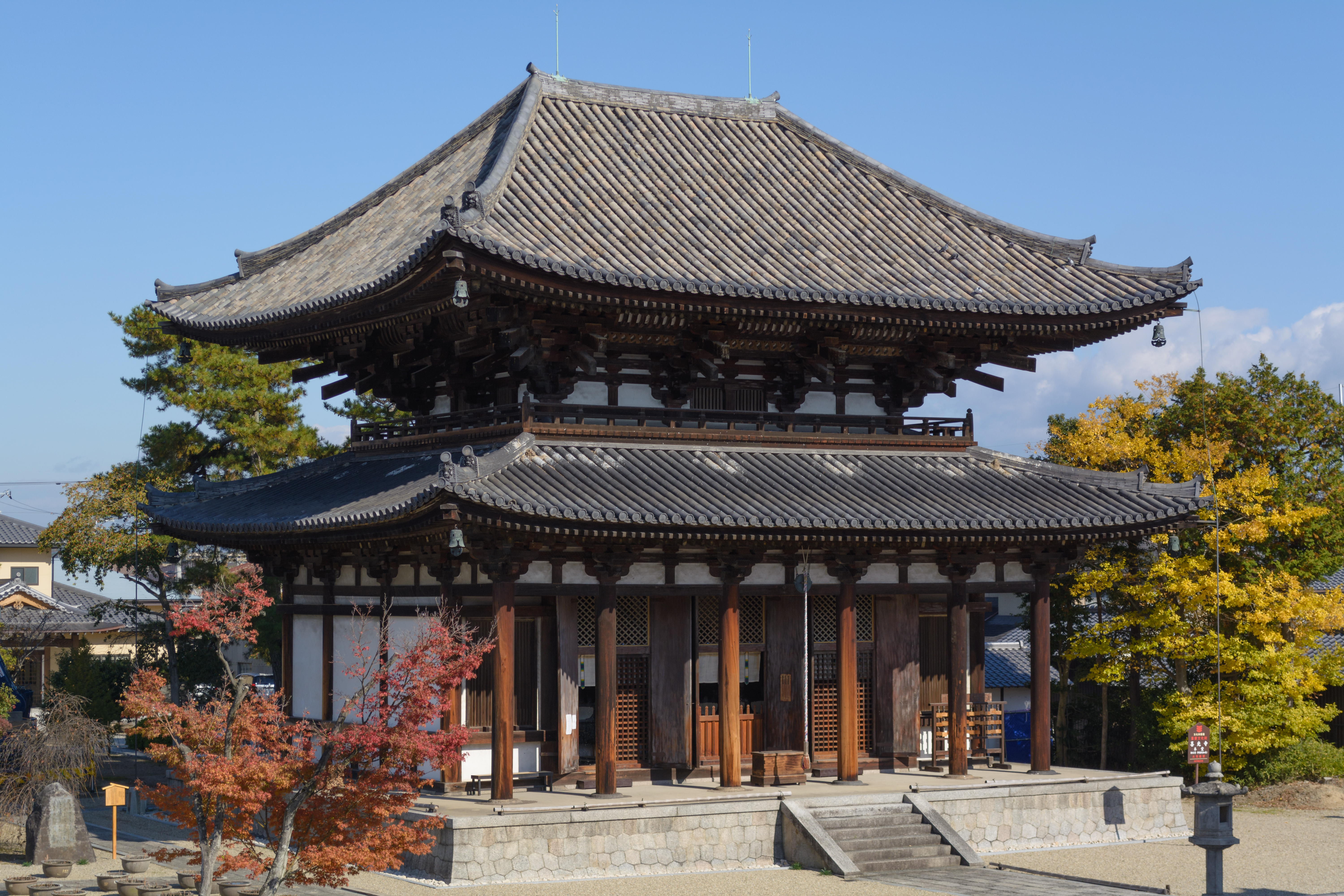 喜光寺本堂（奈良市菅原町）